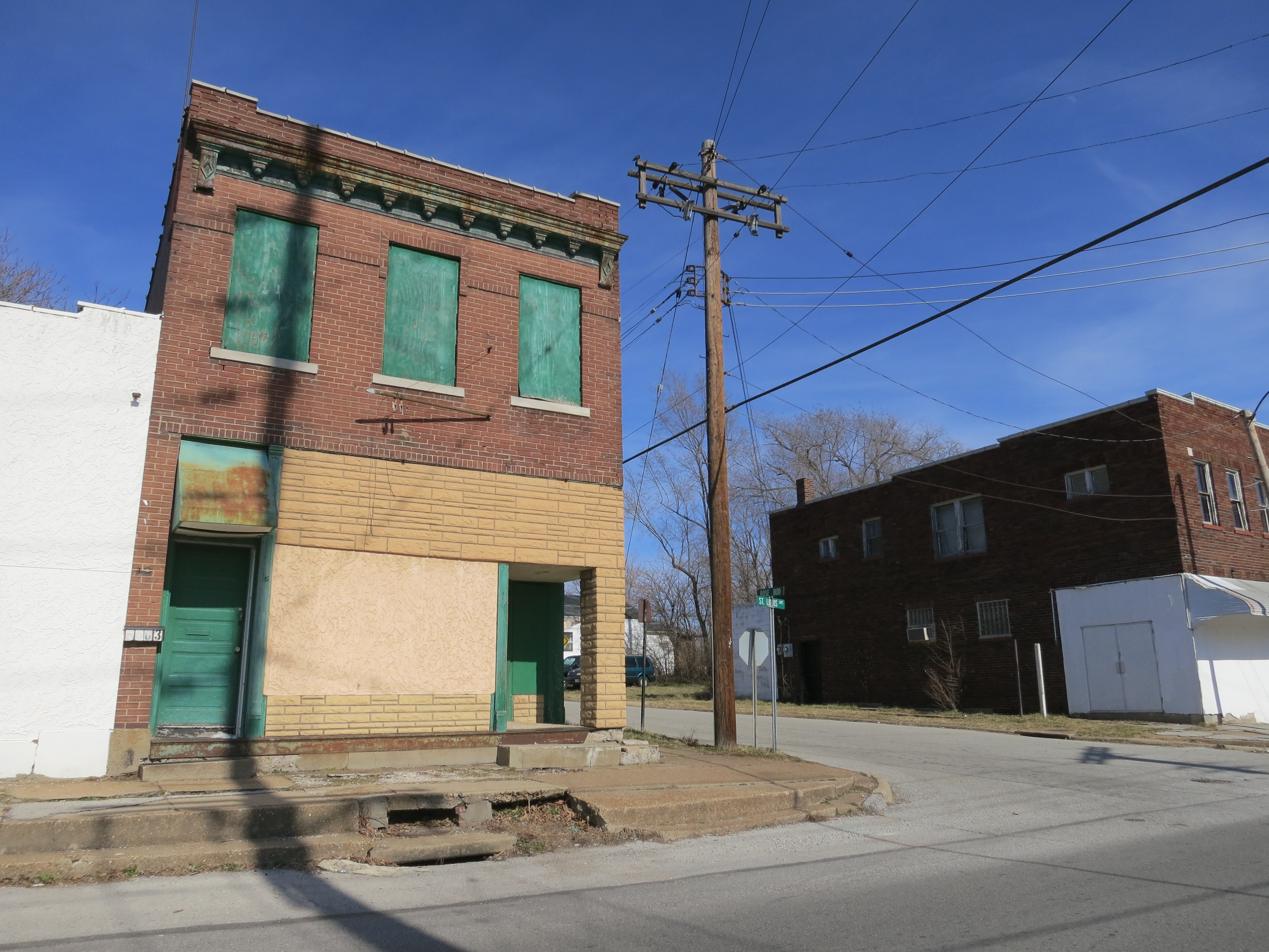 Hillsdale, MO